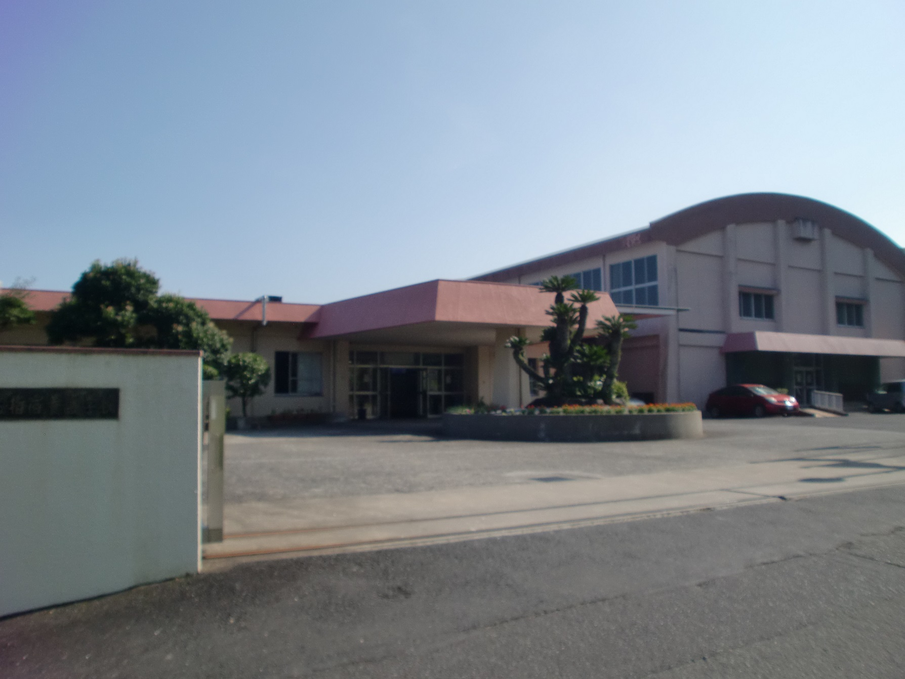 鹿児島県立指宿養護学校の外観。